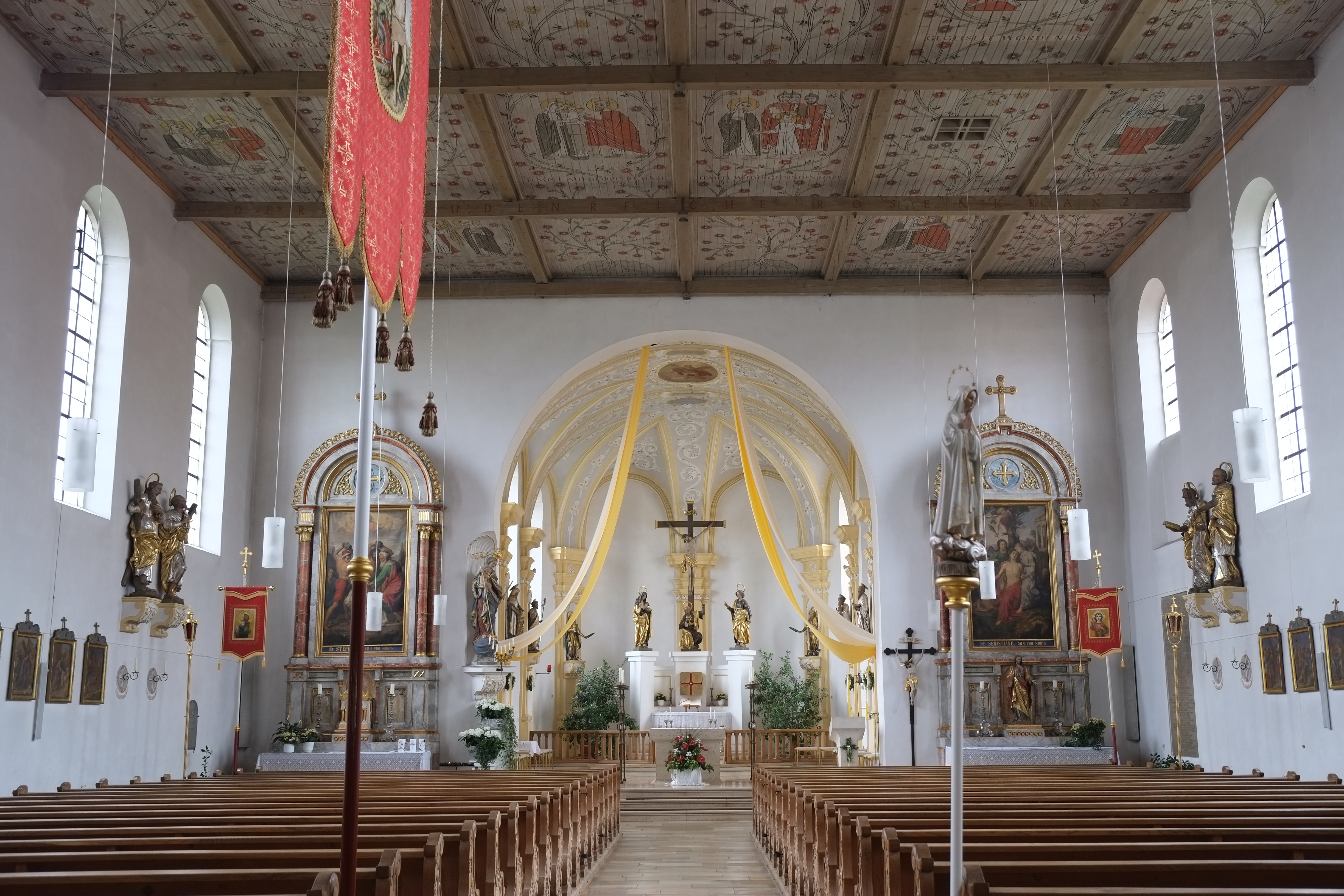 Katholische Pfarrkirche Maria Immaculata in Zusmarshausen im Landkreis Augsburg (Bayern)